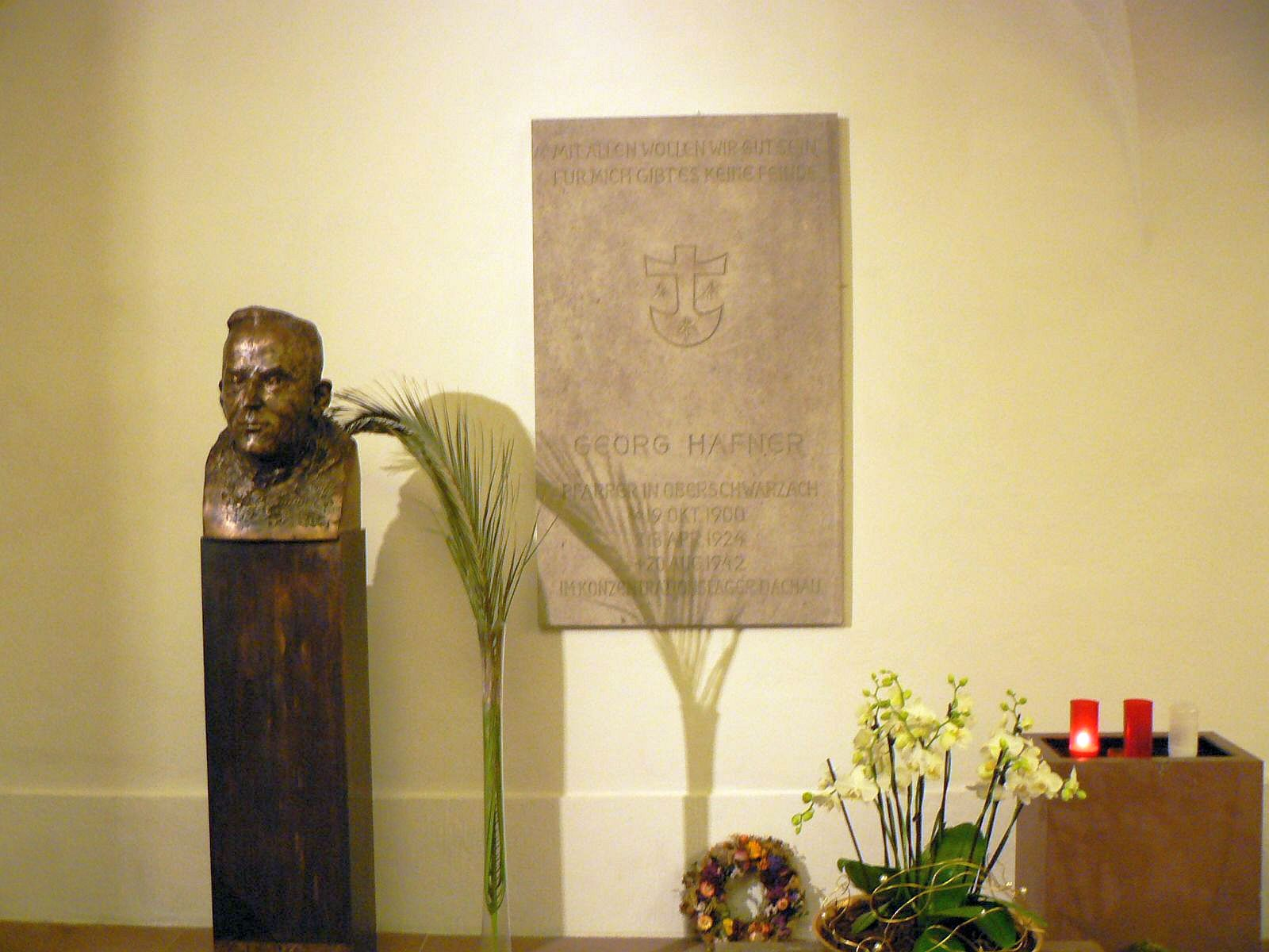 Grablege und Gedenktafel für Georg Häfner, Opfer des Nationalsozialismus, in der Krypta des Neumünster, Würzburg 2010 (heute andere Gestaltung!)